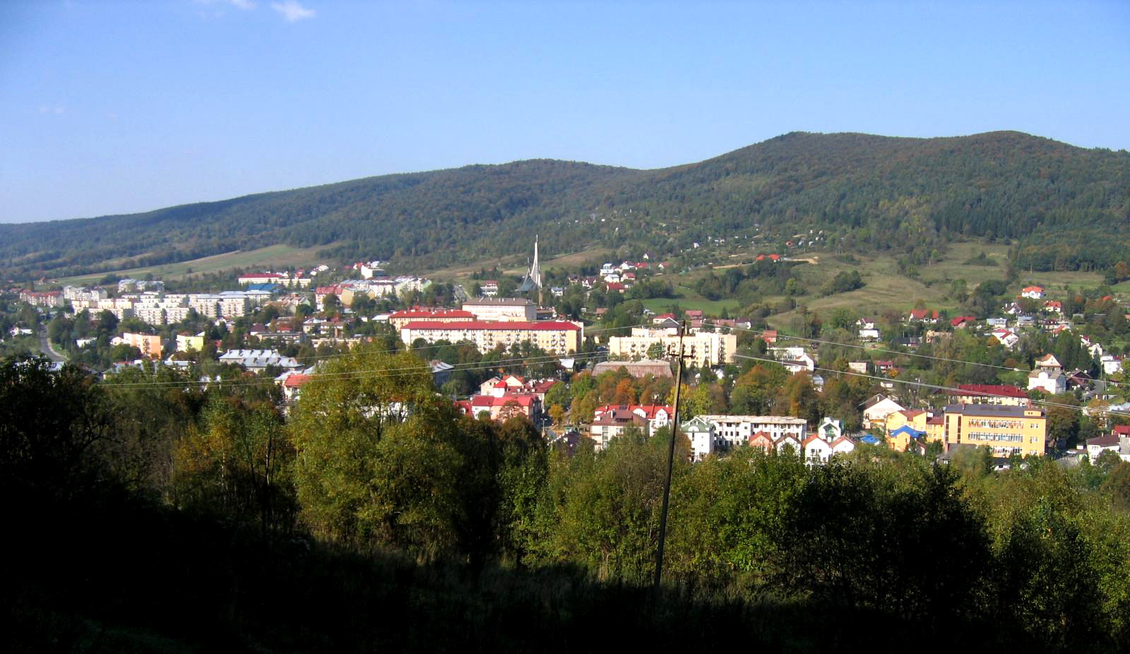 Ustrzyki Dolne - widok ogólny